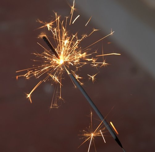 Kategória:Obrázky predmetov